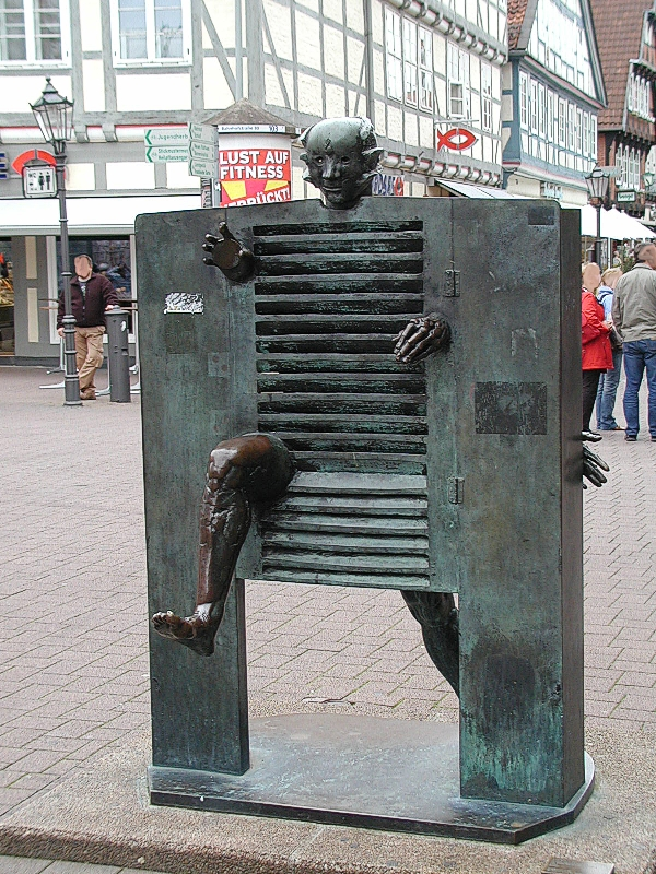 Skulptur "Ein Mann durchstößt die Pforte", von Jean Ipoustéguy, Celle, Niedersachsen